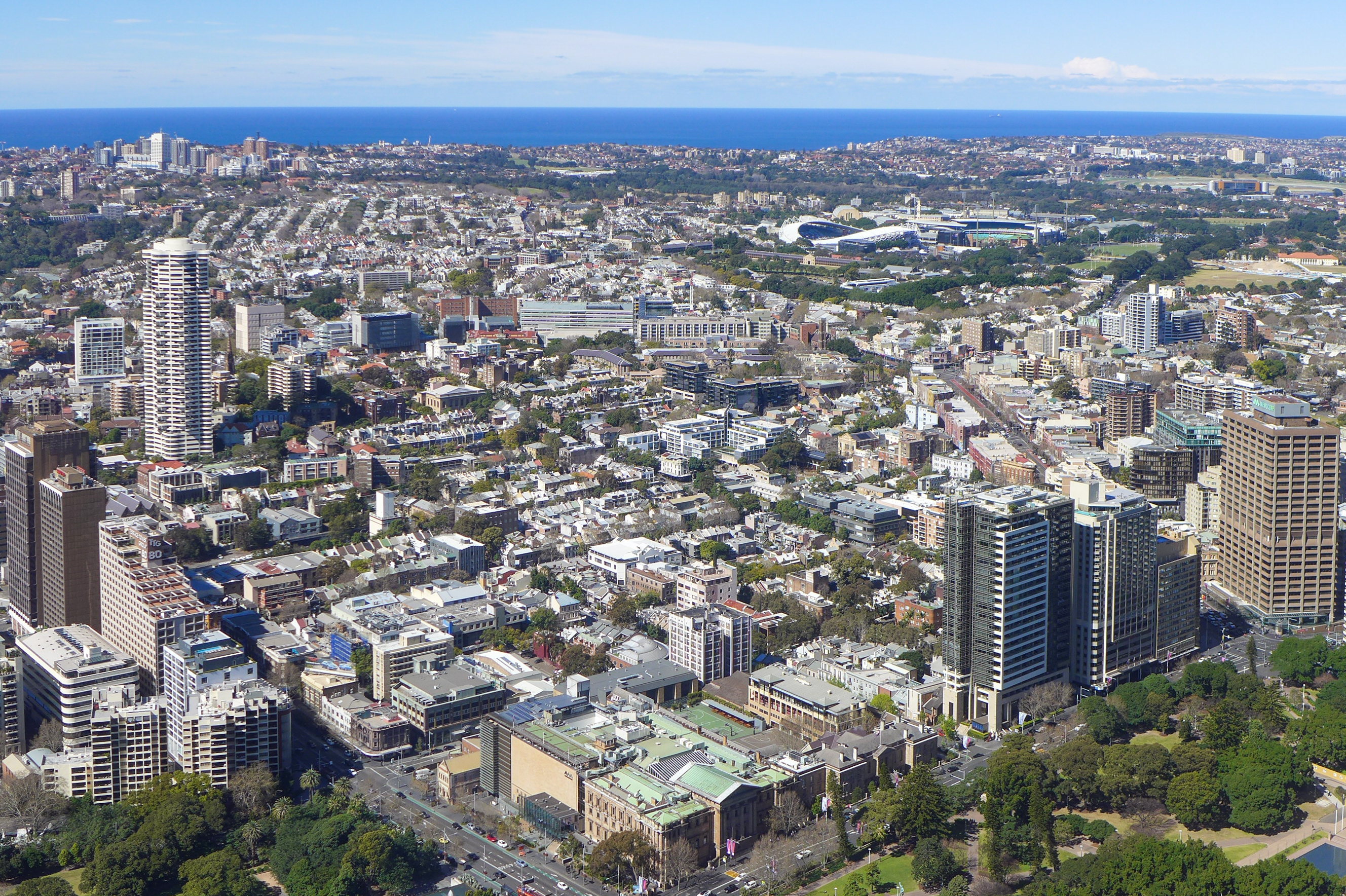 Darlinghurst